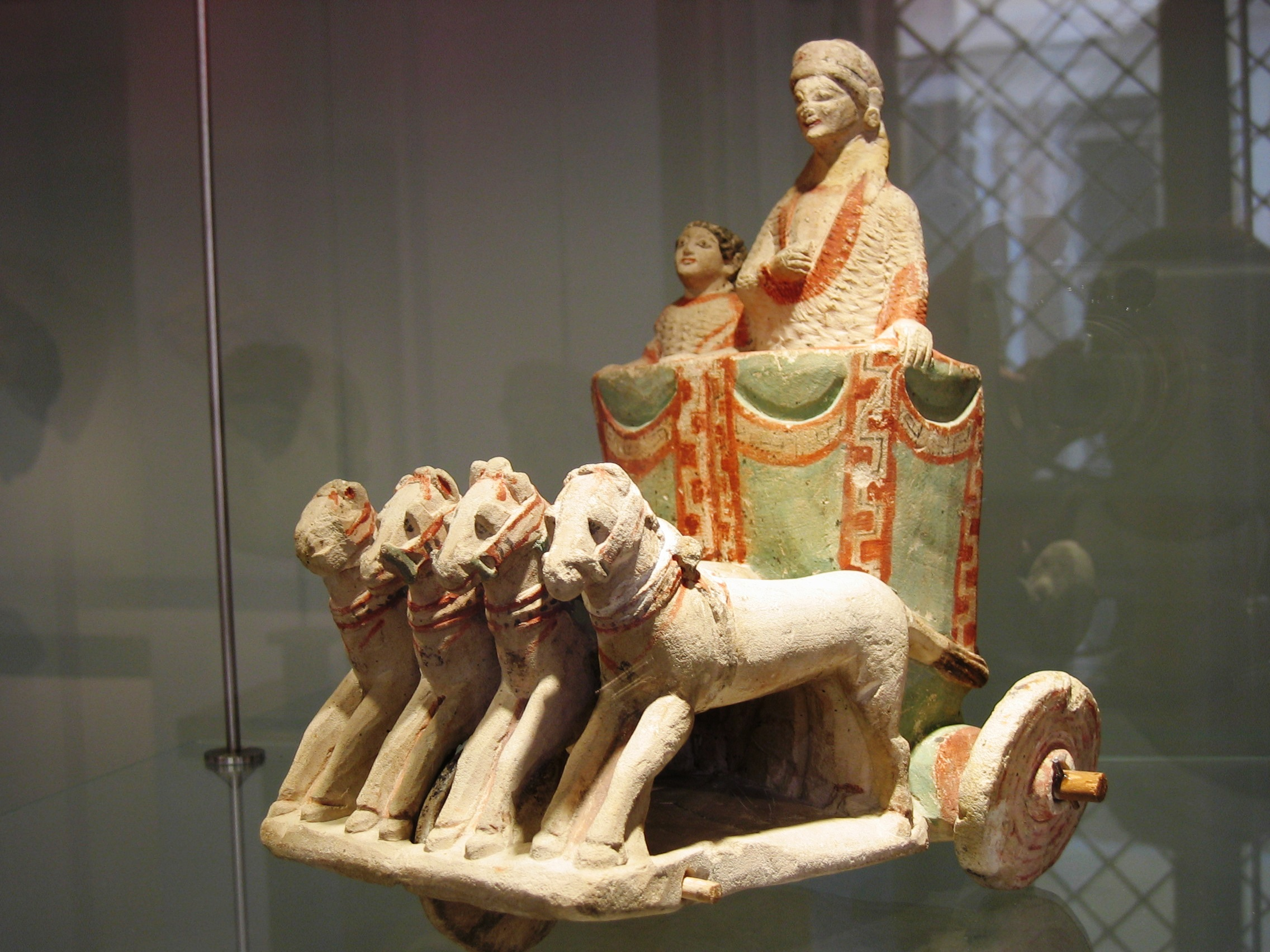 Carro da parata con due personaggi, secondo quarto del V sec. a.C., calcare policromato, Amatunte (Cipro).Museo Barracco, Roma (Italia).